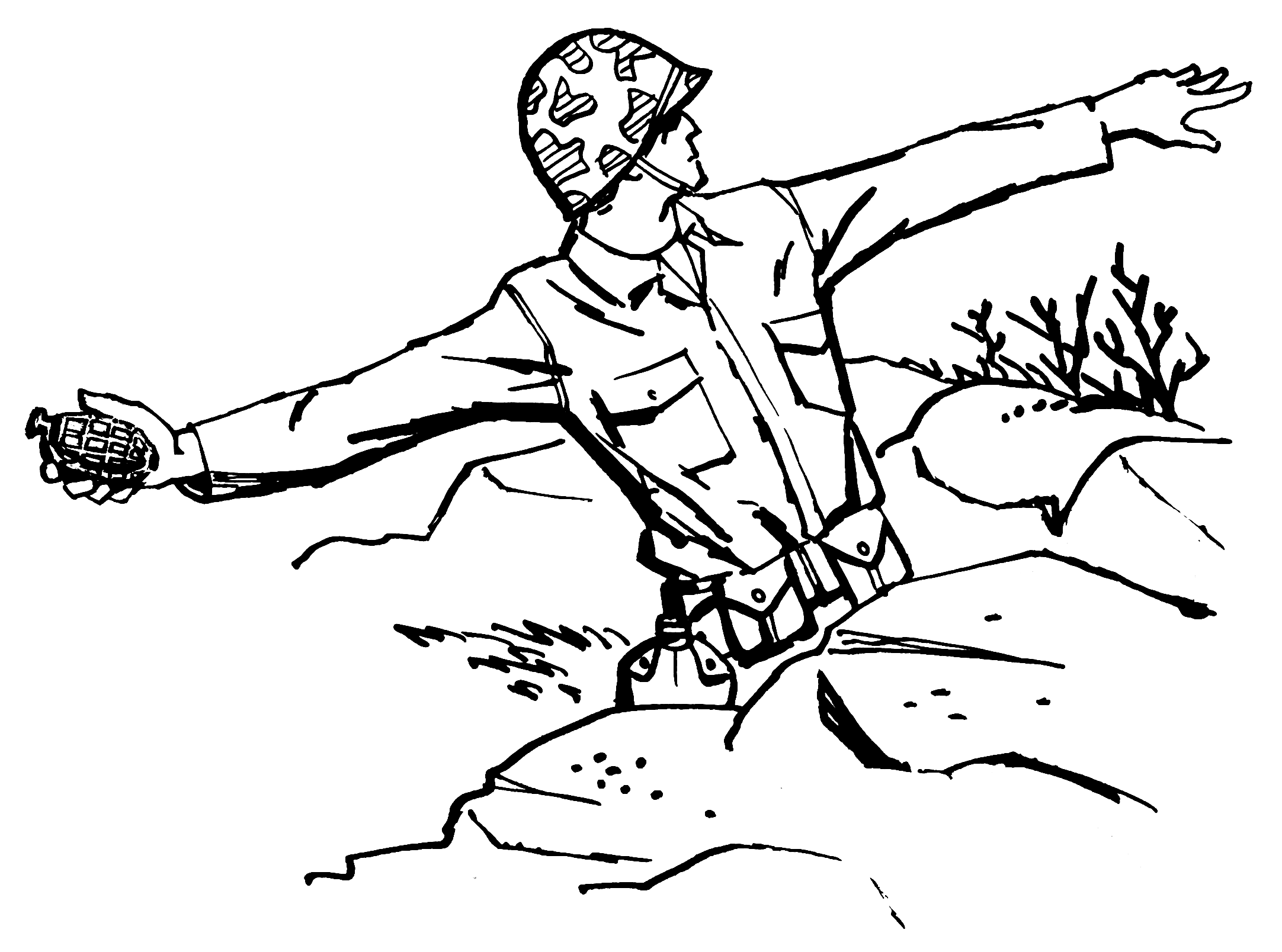 Grenade